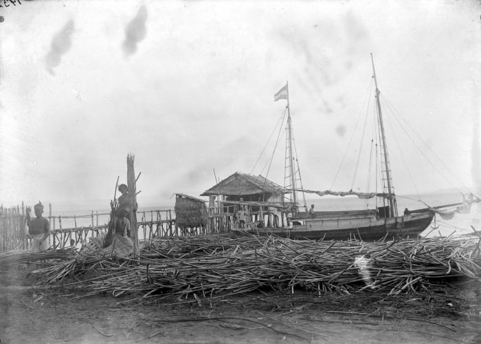 Negatief. Morotai bundelen en laden rotan op een zeilschip te Wajaboela, Morotai, Molukken